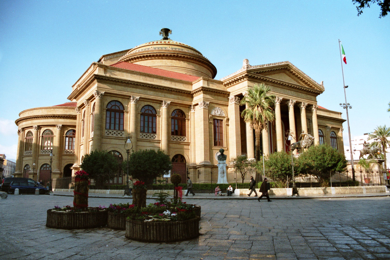 Teatro Massimo, Palermo General view